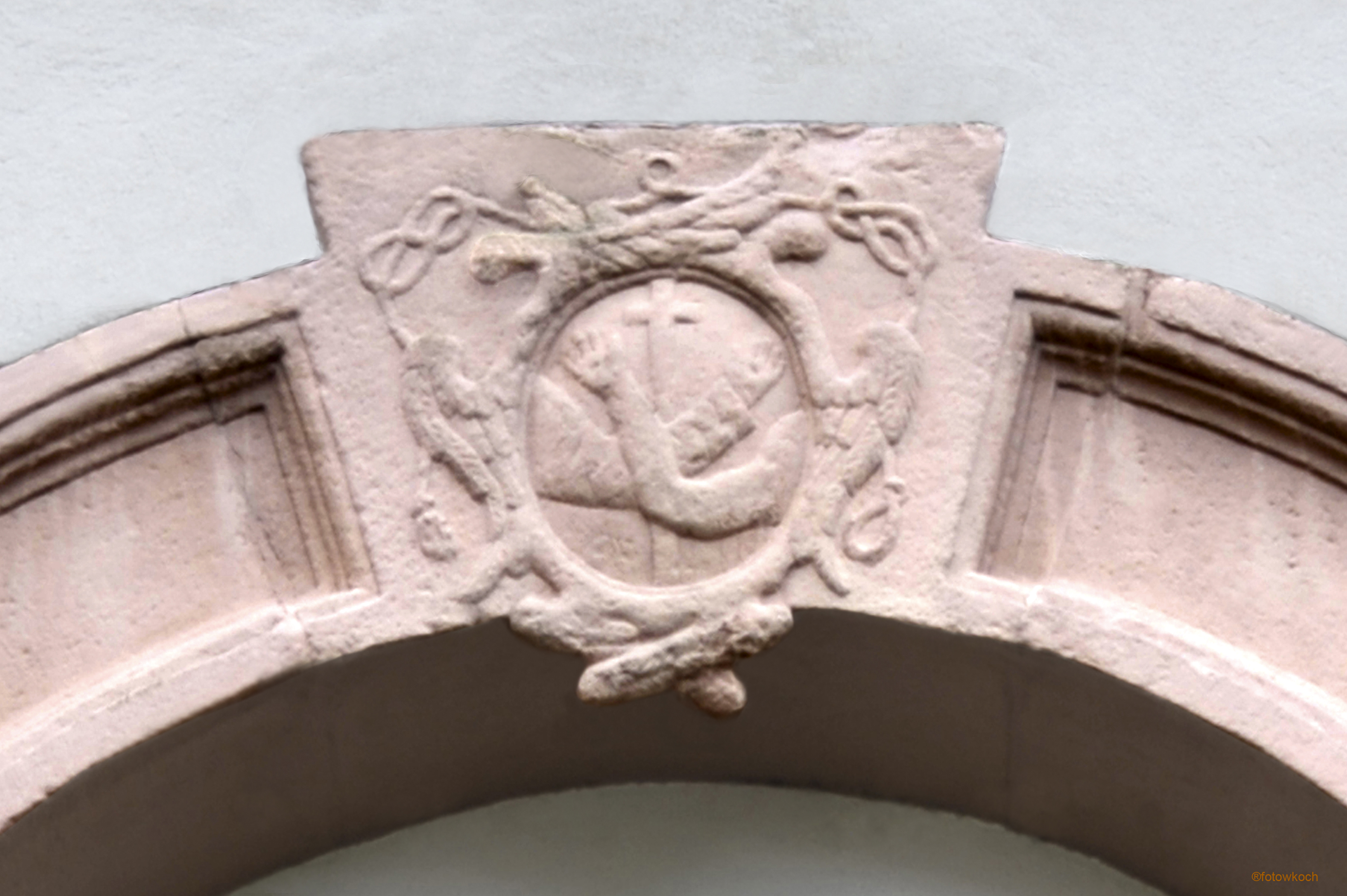 Franziskanerwappen über dem Westportal mit gekreuzten Armen